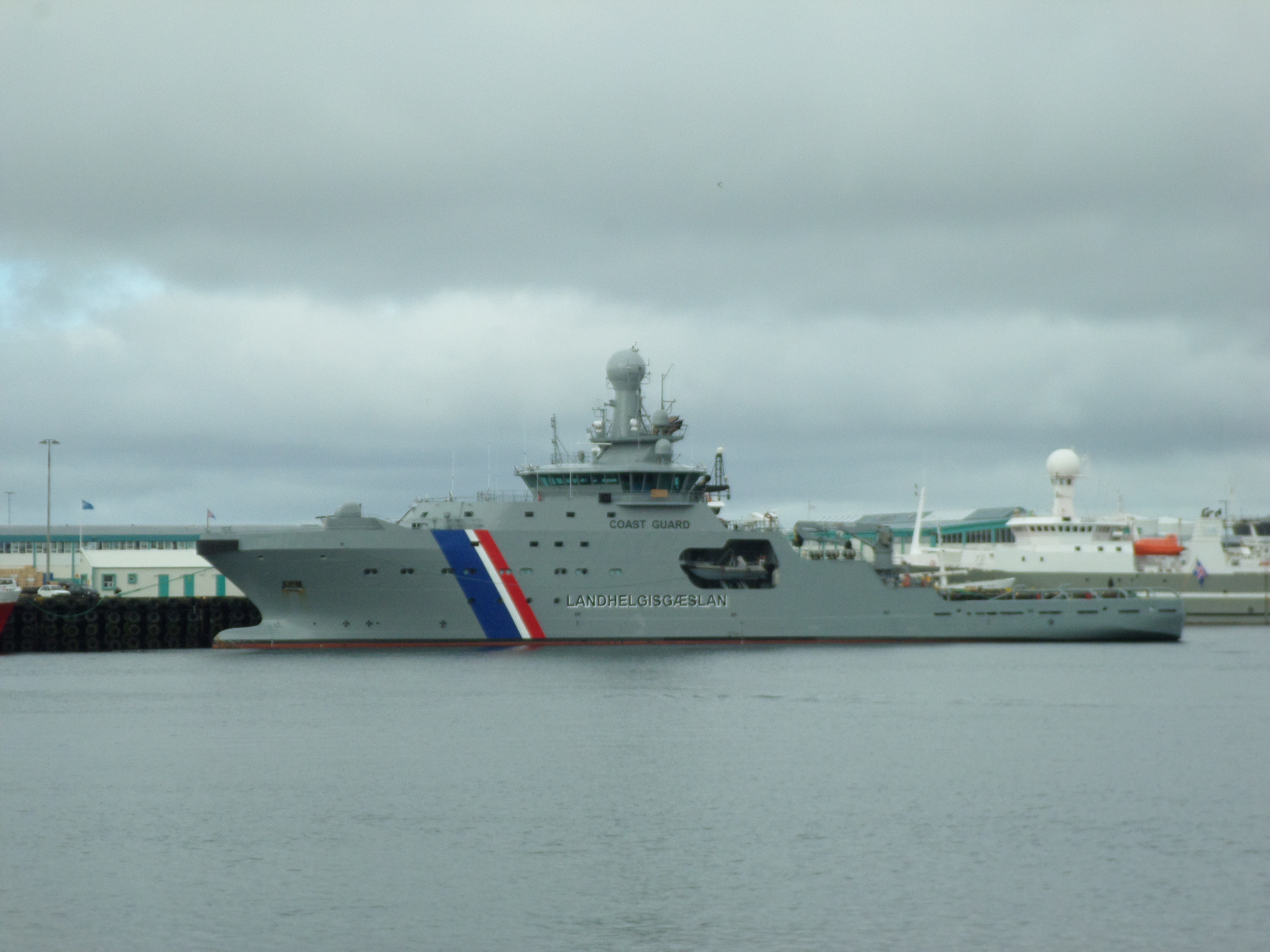 아이슬란드 해안경비대 경비정